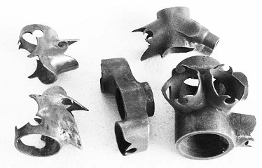 Bewerkte lugset voor duur frame